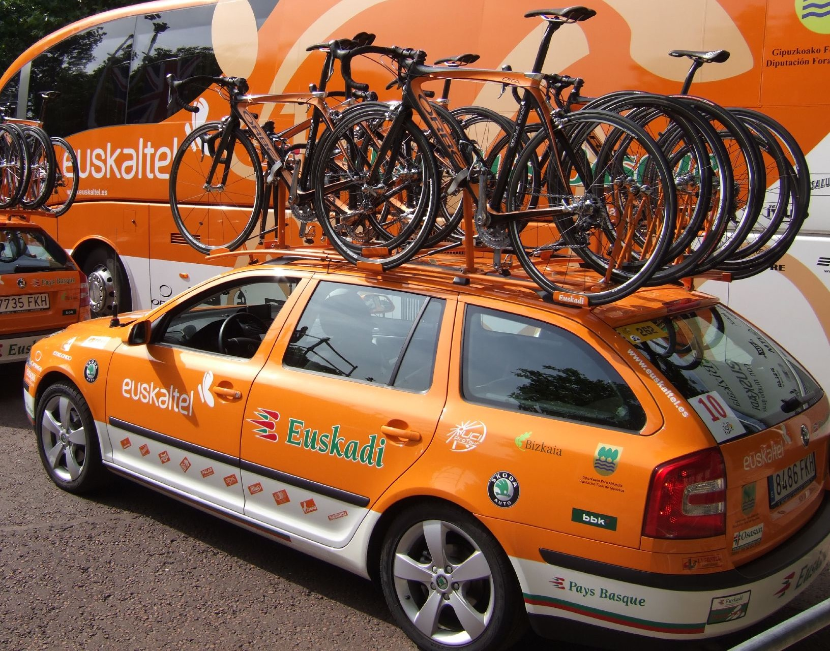 Euskaltel team cars (Tour de France 2007)